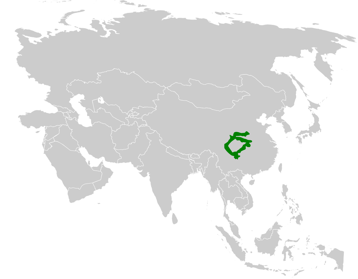 Locustella chengi distribution map, based on